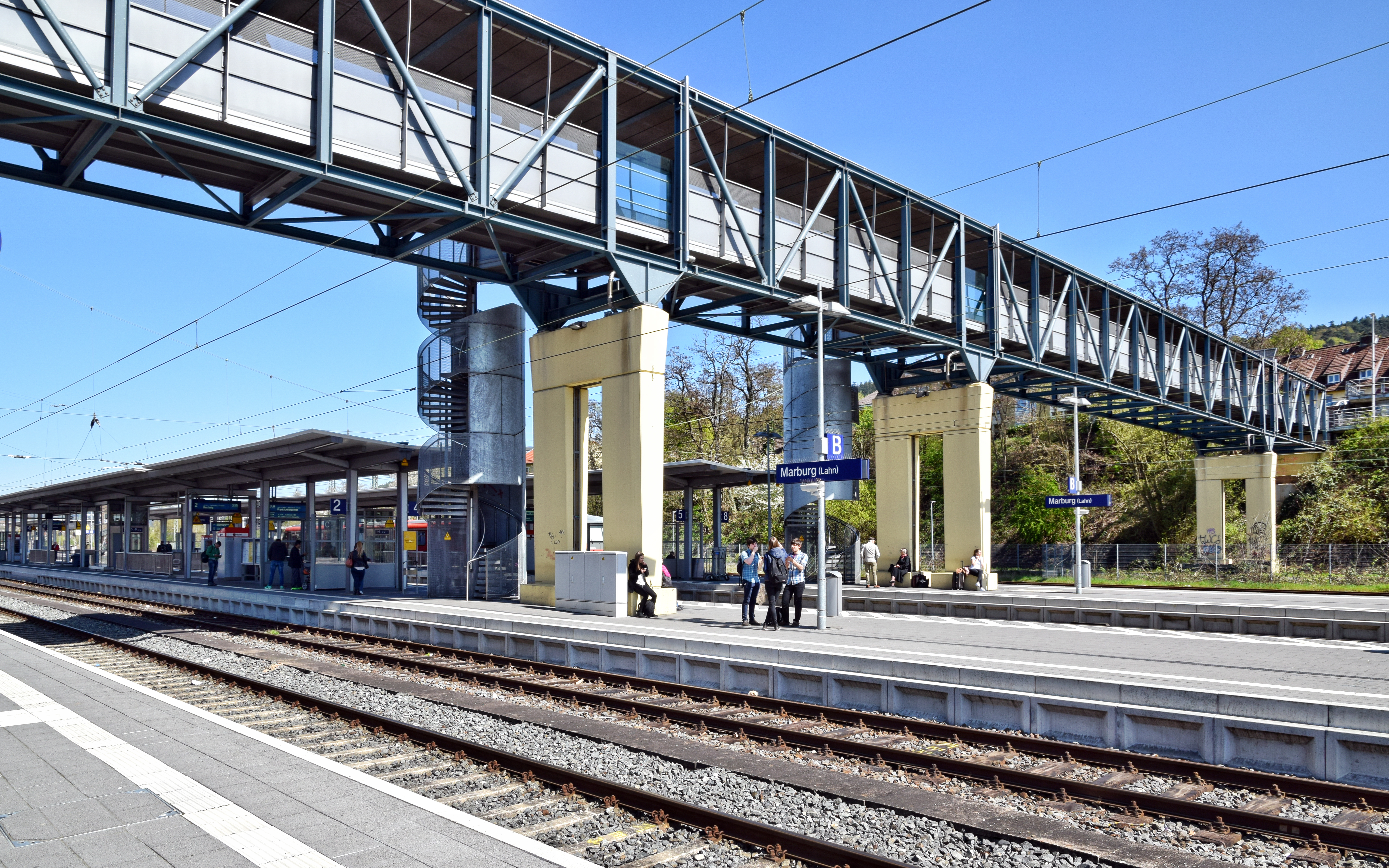 Bahnhof Marburg (Lahn)